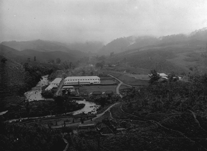 Foto. Rivierandschap met de gebouwen van theeonderneming Pasir Nangka te Soekaboemi op West-Java.